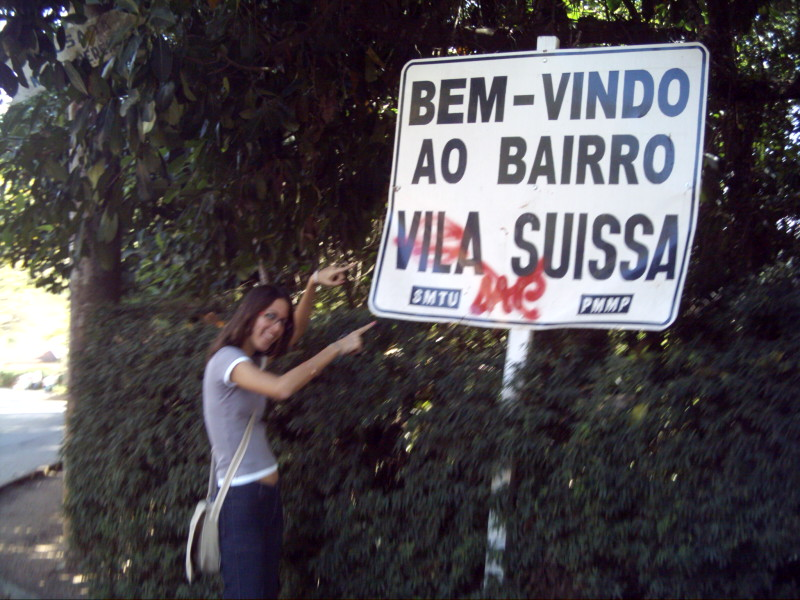 Caroline Rocha na entrada de Vila Suissa, Miguel Pereira, RJ.